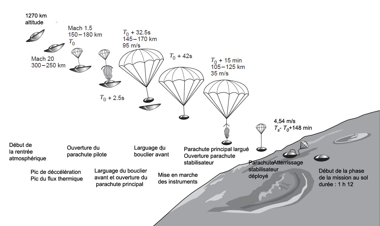 Schéma atterrissage Huygens avec une légende en francais